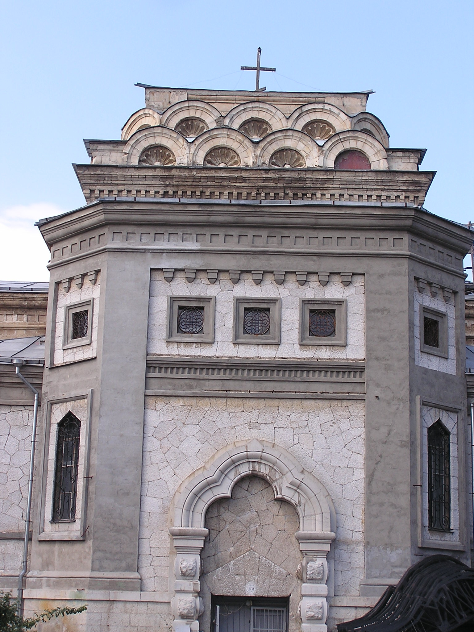 Храм архангела Михаила в Алупке